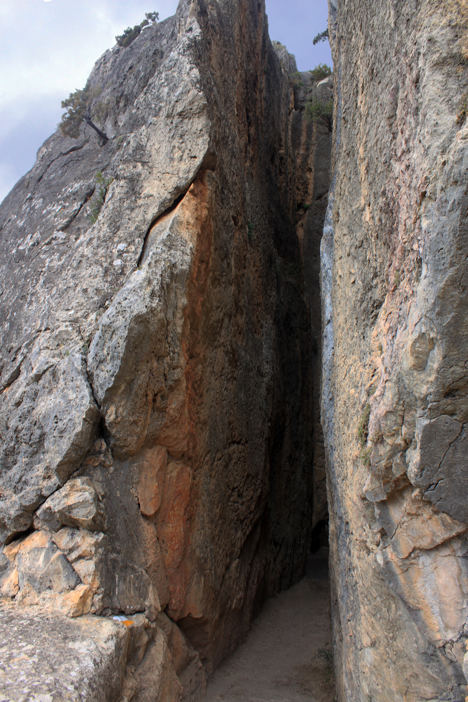 Vista de la Peña Cortada, obra romana excavada en la roca para permitir el transporte de agua.Localidad de Calles, provincia de Valencia, Comunidad valenciana.